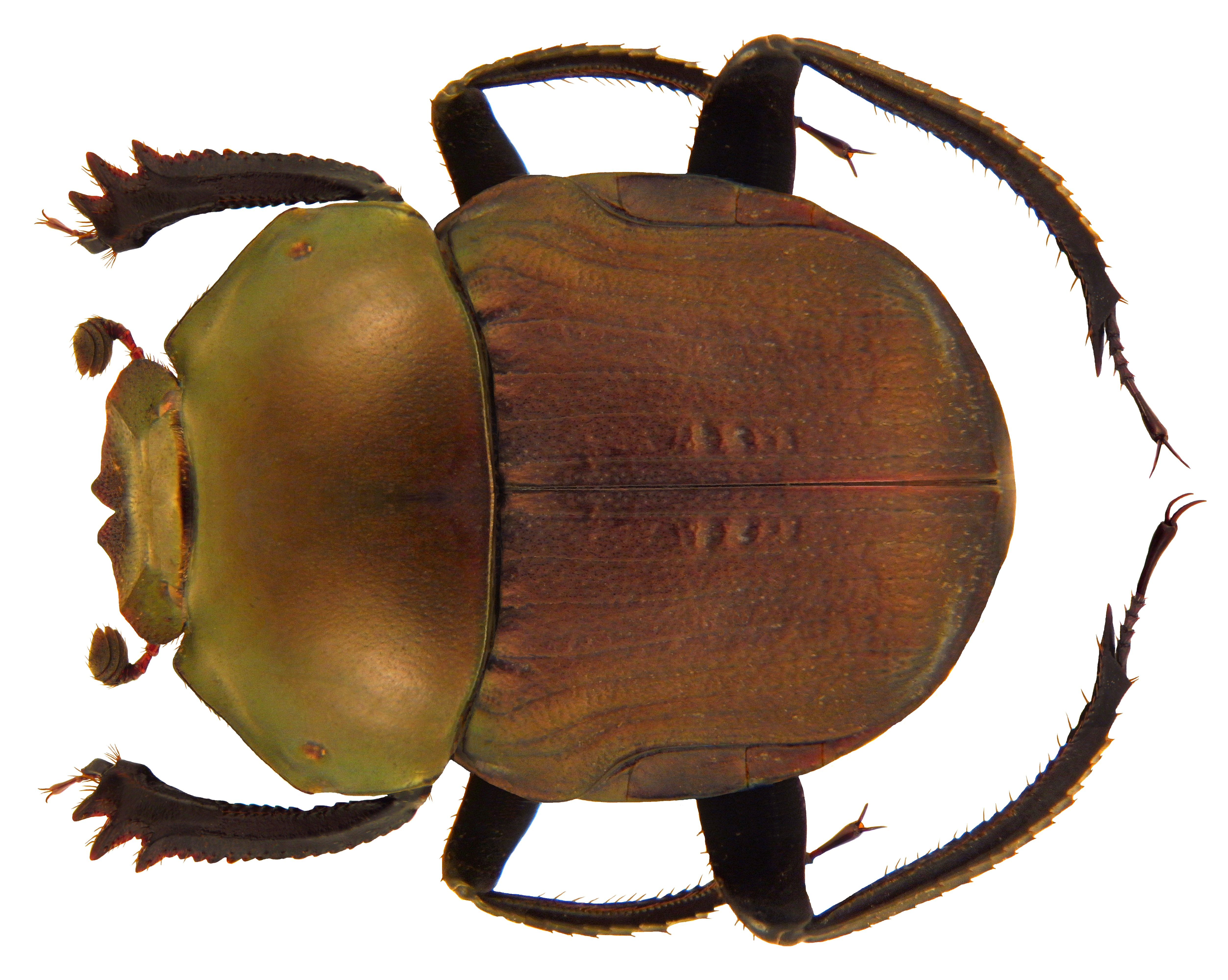 Familie: Scarabaeidae Groesse: 18,3 mm Fundort: Malaysia, Borneo, Sabah, Mt. Kinabalu, 500 m leg. A.Smetana, 1988; det. J.Scheuern, 1993 Photo: U.Schmidt, 2010